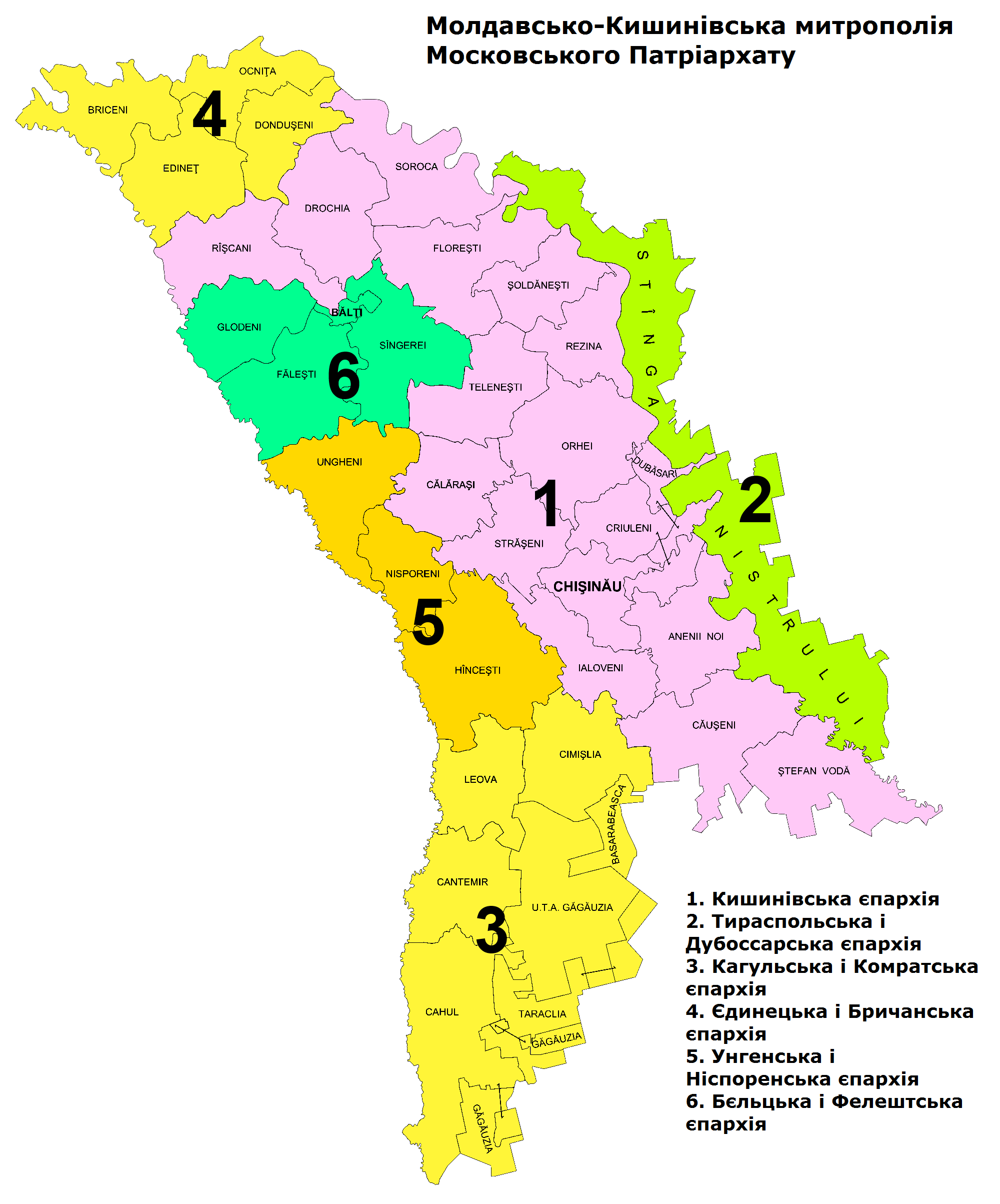 українська версія мапи File:Православная церковь Молдовы (Московский патриархат).png